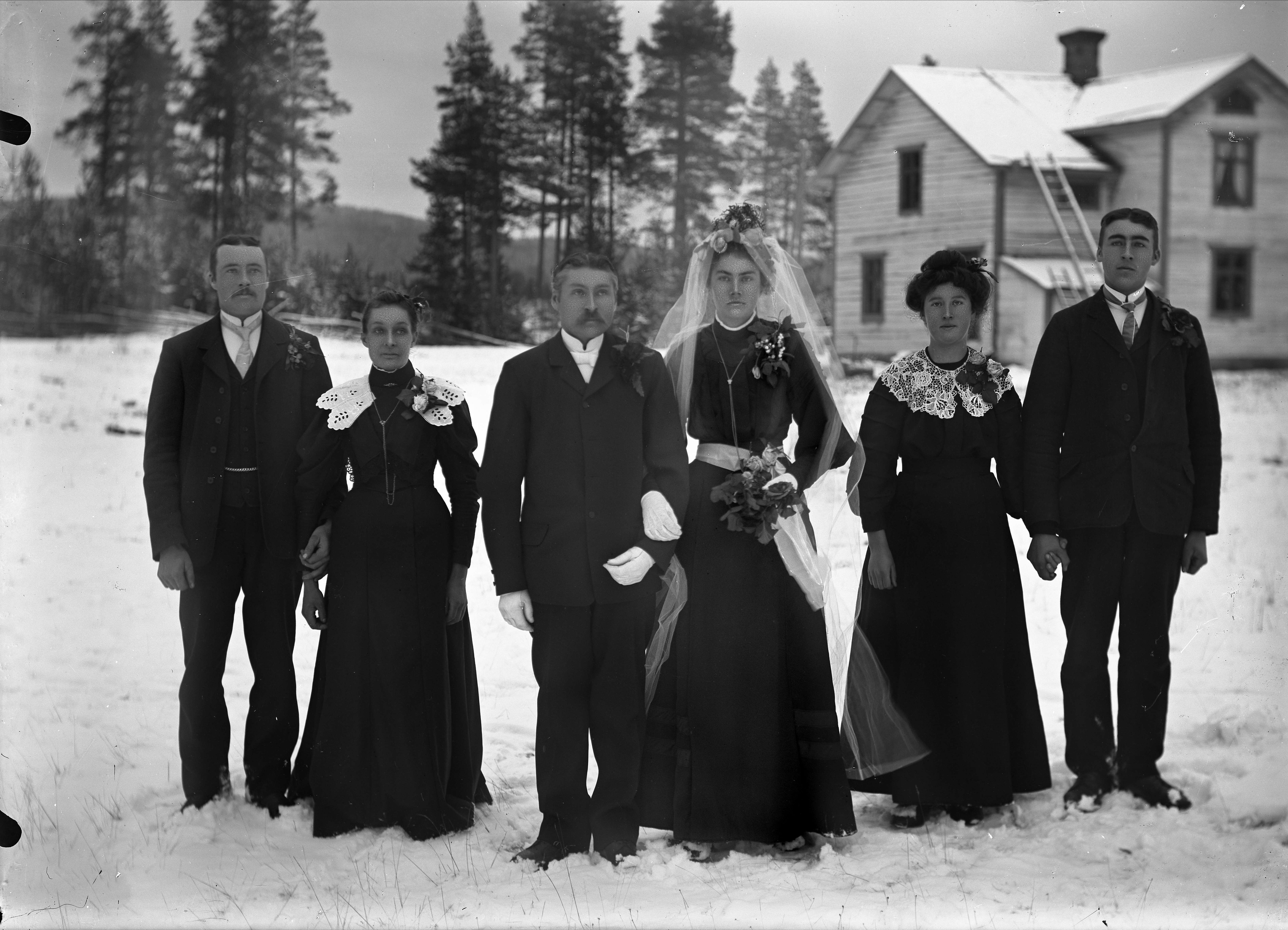 Bröllop. Brudpar, bruden i svart klänning och vit slöja. Två andra par, marskalkar och tärnor, stående på var sin sida om brudparet. Samtliga, män och kvinnor, har blommor fästade på vänster axel. Bodums socken, Ångermanland.